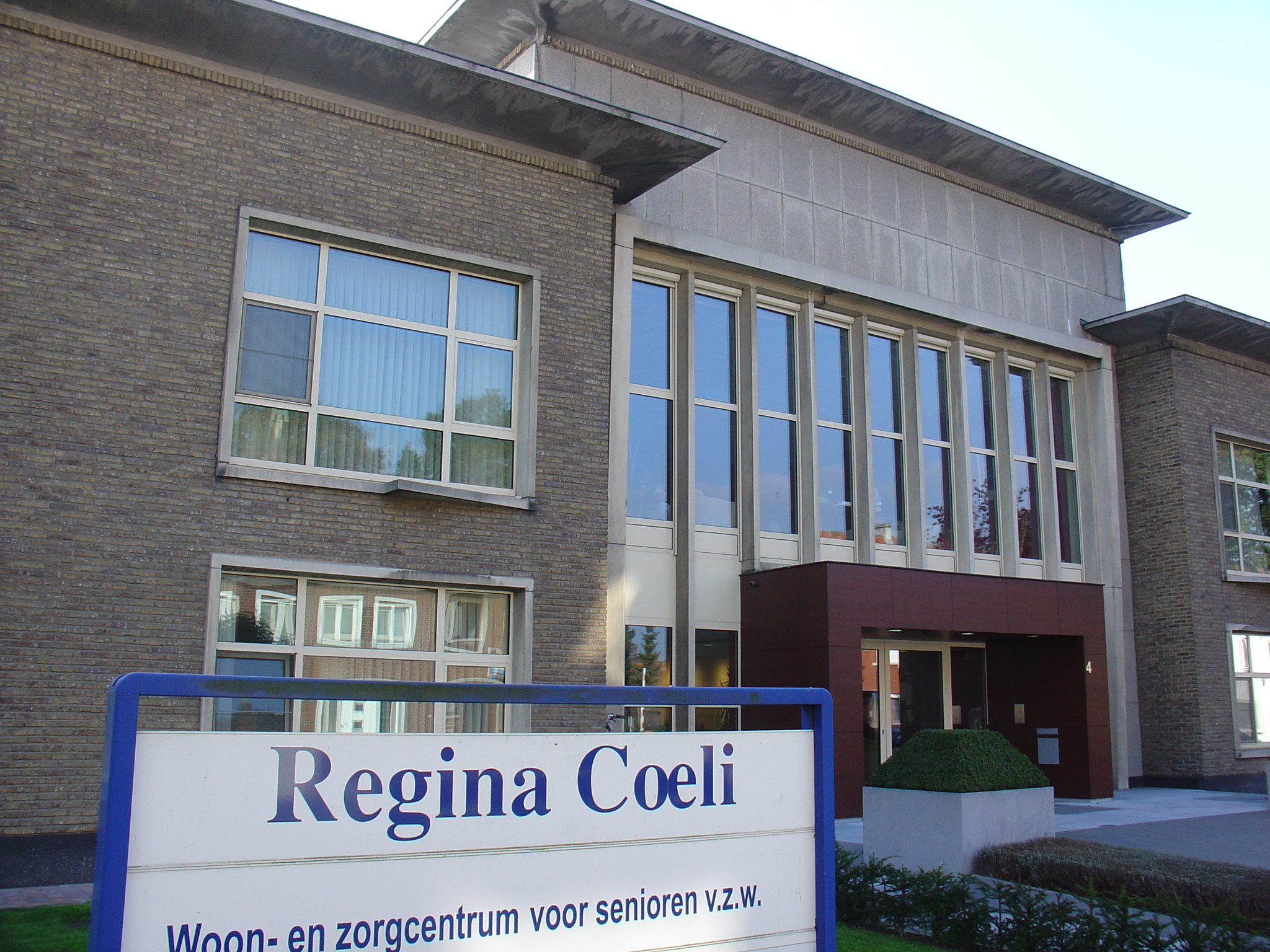 Regina Caeli hoofdingang